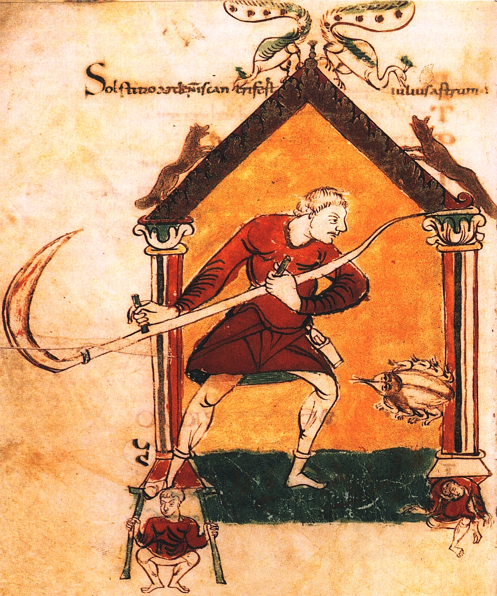 Juli, Maryrologium des Wandalbert von Prüm, Detail